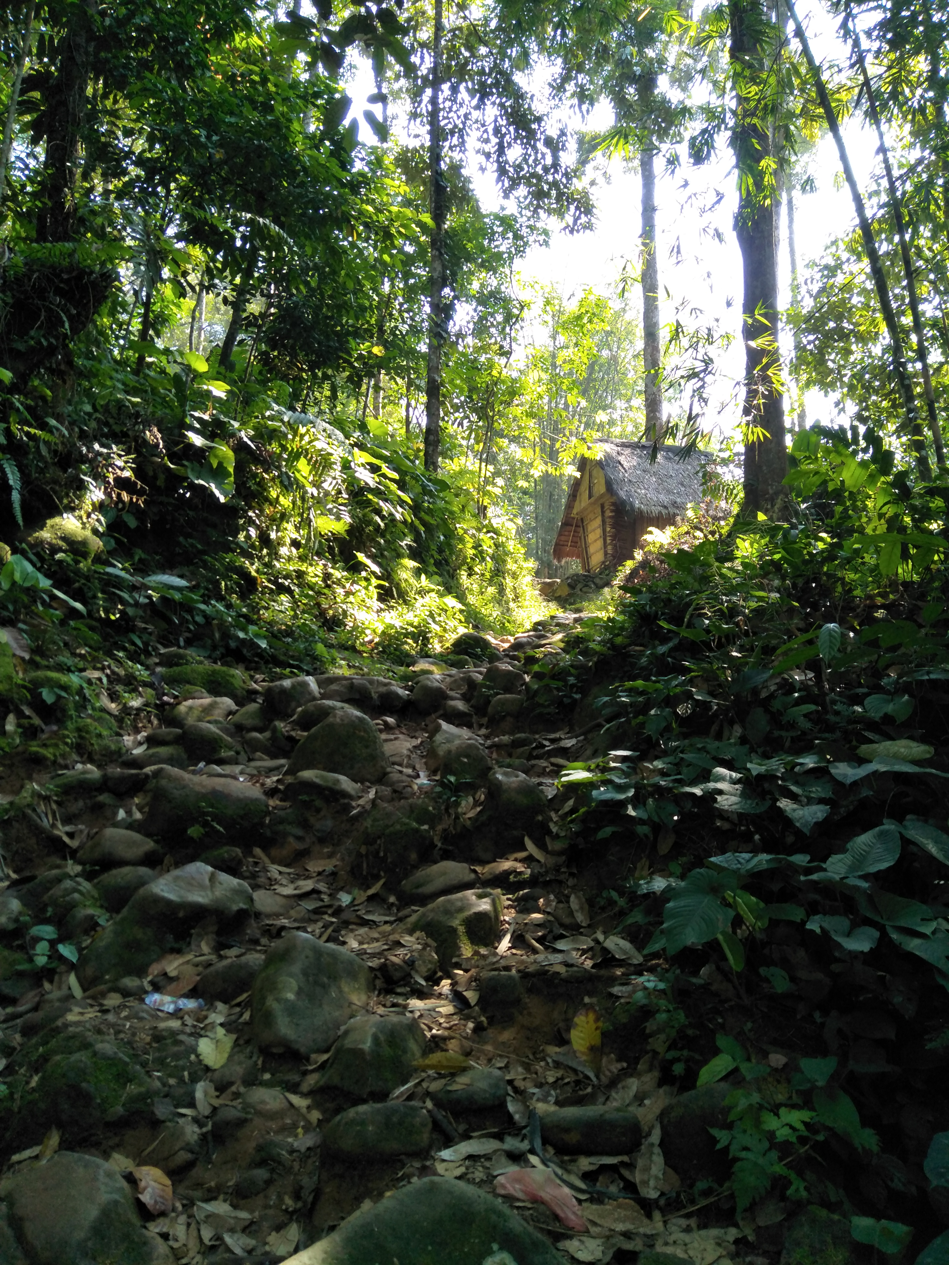 Jalan terjal terkadang harus dilalui dalam menuju desa suku Baduy Dalam.